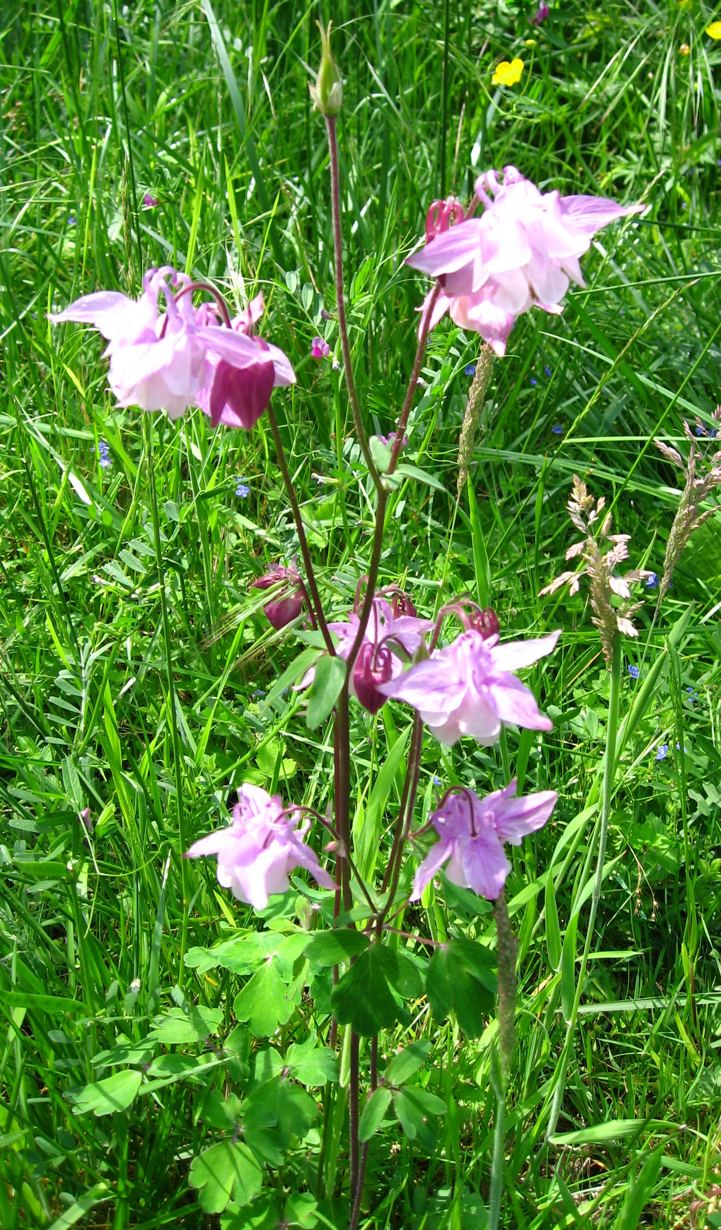 Aquilegia vulgaris in Jardin de l'ile verte Map: 48° 46' 27" N 2° 16' 14" E